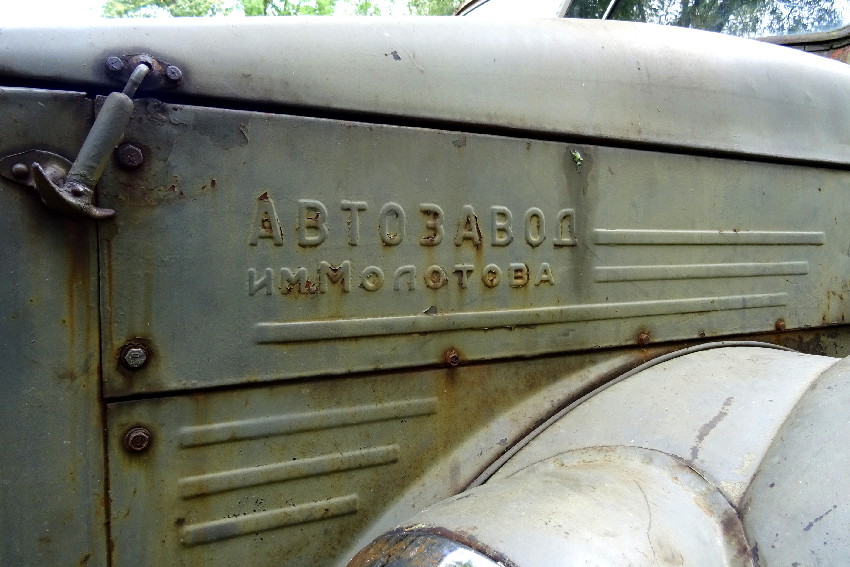 Napis na masce marki lekkiego samochódu ciężarowego GAZ 51 z wczesnej produkcji tzw. "Mołotowca" (od nazwiska patrona zakładów, komunisty Mołotowa). Późniejsza produkcja bez tego wyróżnika.